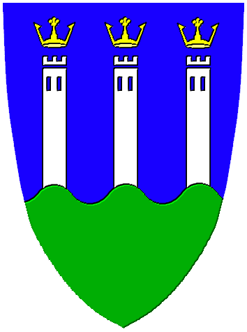 Stema „Scaunului Rupea” (în germană Stuhl Reps / Kosd, în maghiară Kőhalom szék), considerat ca scaunul săsesc estic, în germană östlichster Stuhl, a primit inițial numele de „Scaunul Kosd” (în germană Kosder Stuhl), de la râul Kosd/Cosd, în germană Kosdbach sau Kosd-Bach, în latina medievală rivulus Kozd, un afluent al Oltului.